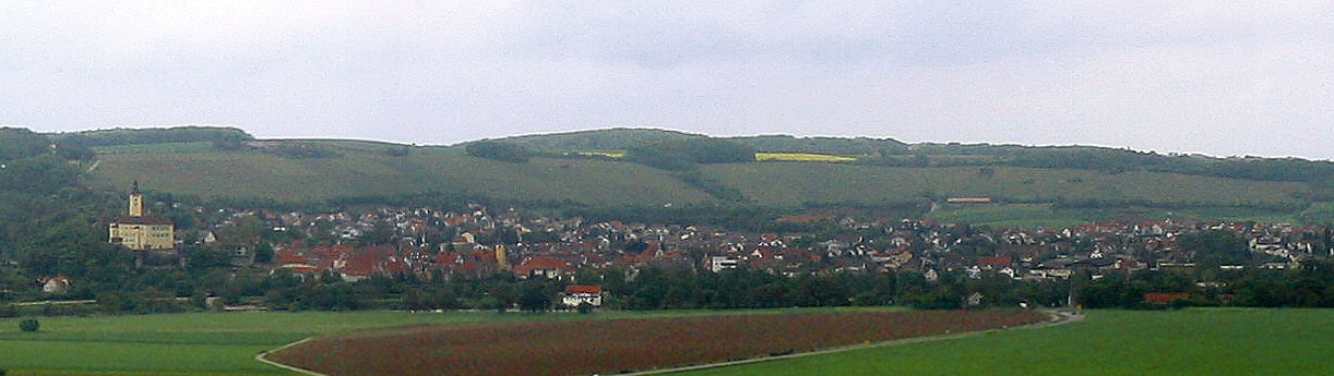 Detailvergrößerung des Stadtpanoramas von Gundelsheim am Neckar